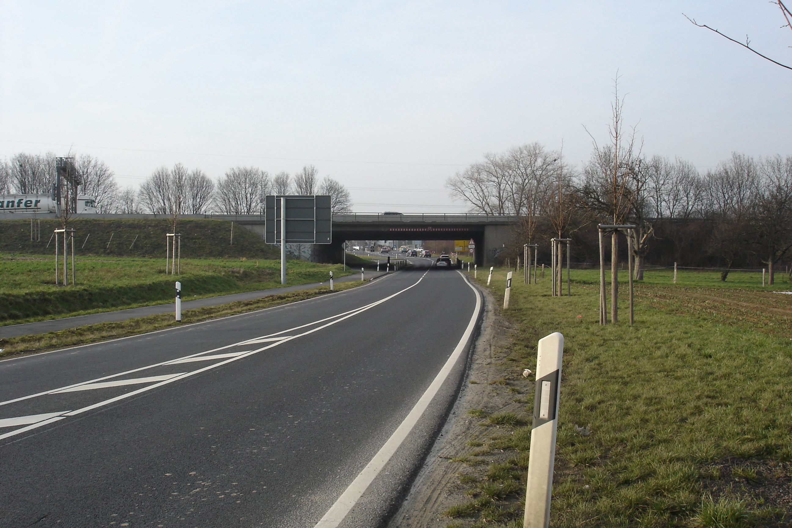 Ende der Homburger Landstraße (Ffm-Nieder-Eschbach) an der A5